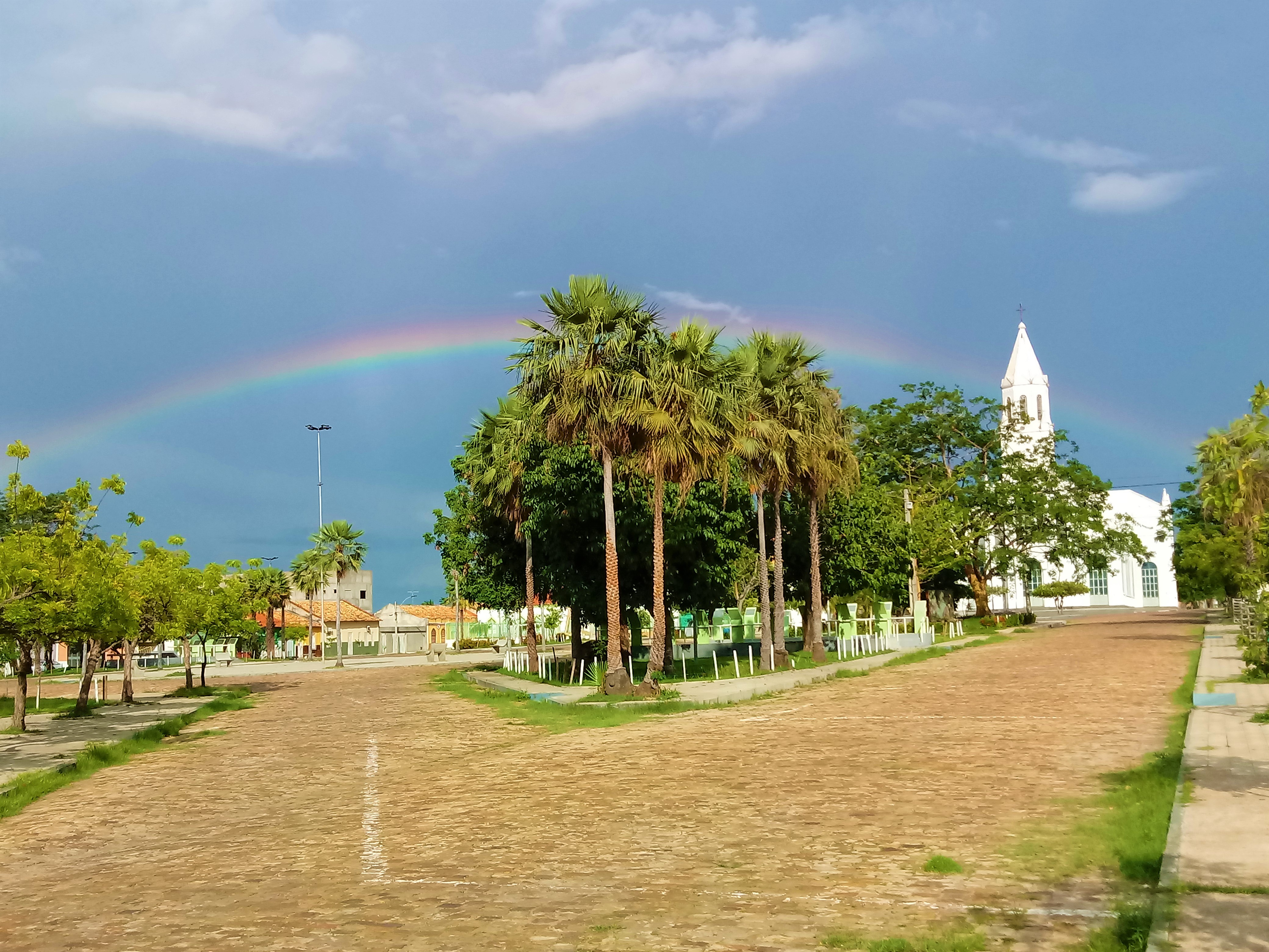 Vista parcial do arvoredo da Praça Bona Primo em Campo Maior-PI.